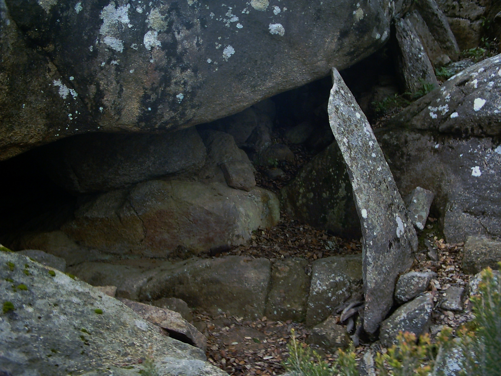 Paradolmen de Ses Rates. Tossa de Mar (Girona, Catalunya).